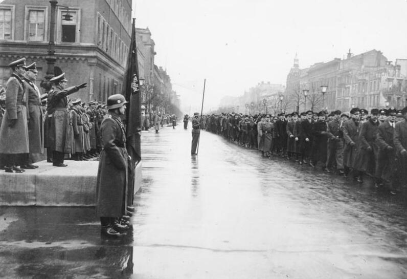 Der Tag des Deutschen Volkssturmes in der Hauptstadt Die Reichshauptstadt stand am Sonntag [12.11.1944] ganz im Zeichen der Vereidigung der Hunderttausende von Männern des Deutschen Volkssturmes. Der Mittelpunkt der Veranstaltungen in Berlin war die Vereidigungsfeier, der der Führer des Berliner Volkssturmes, Reichsminister Dr. Goebbels, beiwohnte. Nach der Vereidigung marschierten due Berliner Volkssturmbataillone an ihrem Gauleiter vorbei. Scherl Bilderdienst (Schwahn), 13.11.1944 [Herausgabedatum]